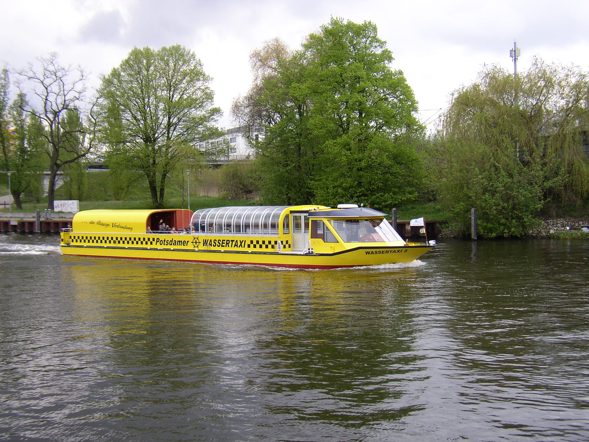 Wassertaxi 2 in Potsdam / Water taxi 2 in Potsdam